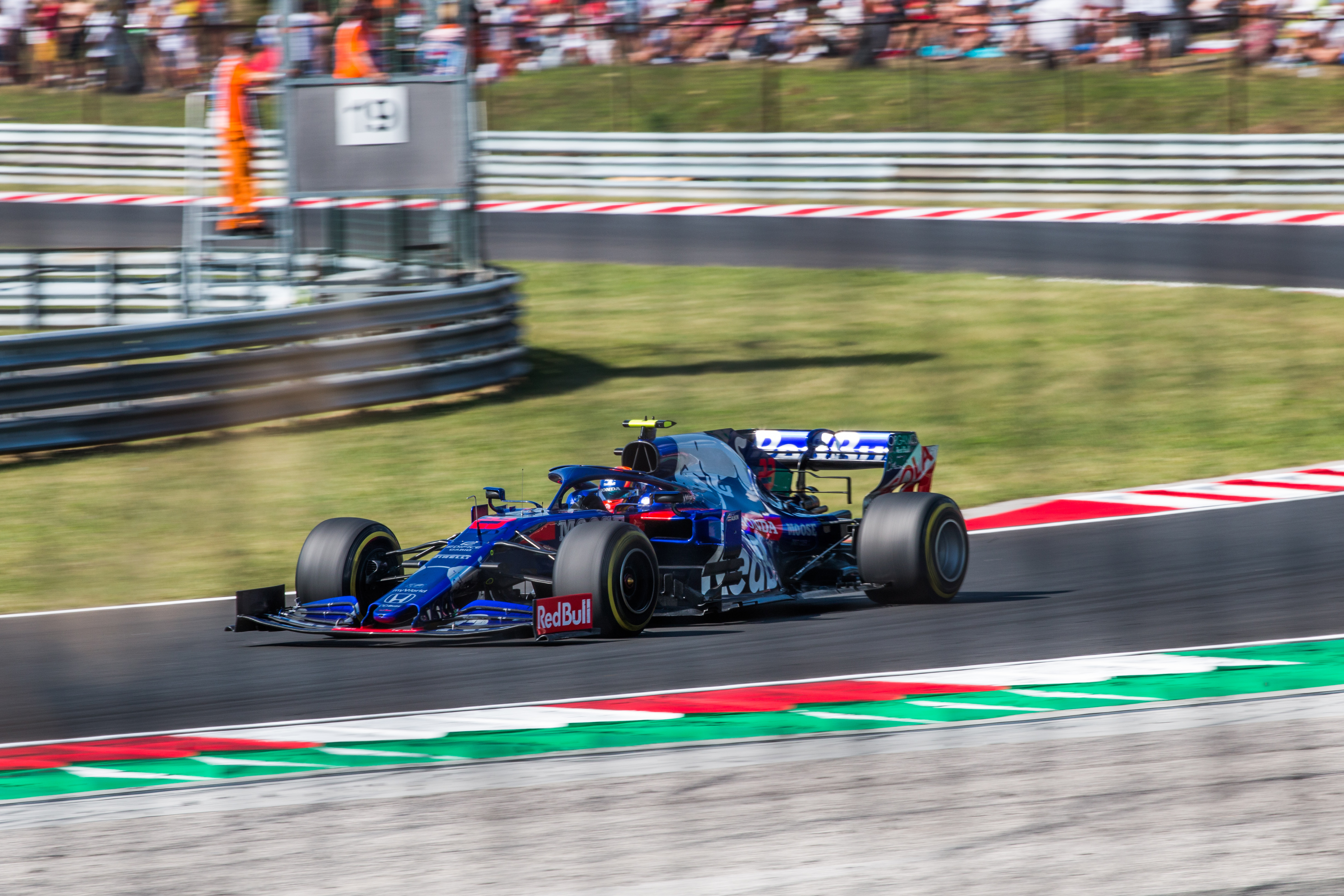 Alexander Albon in his Toro Rosso STR14 during Formula 1 Hungarian Grand Prix 2019 on the Hungaroring